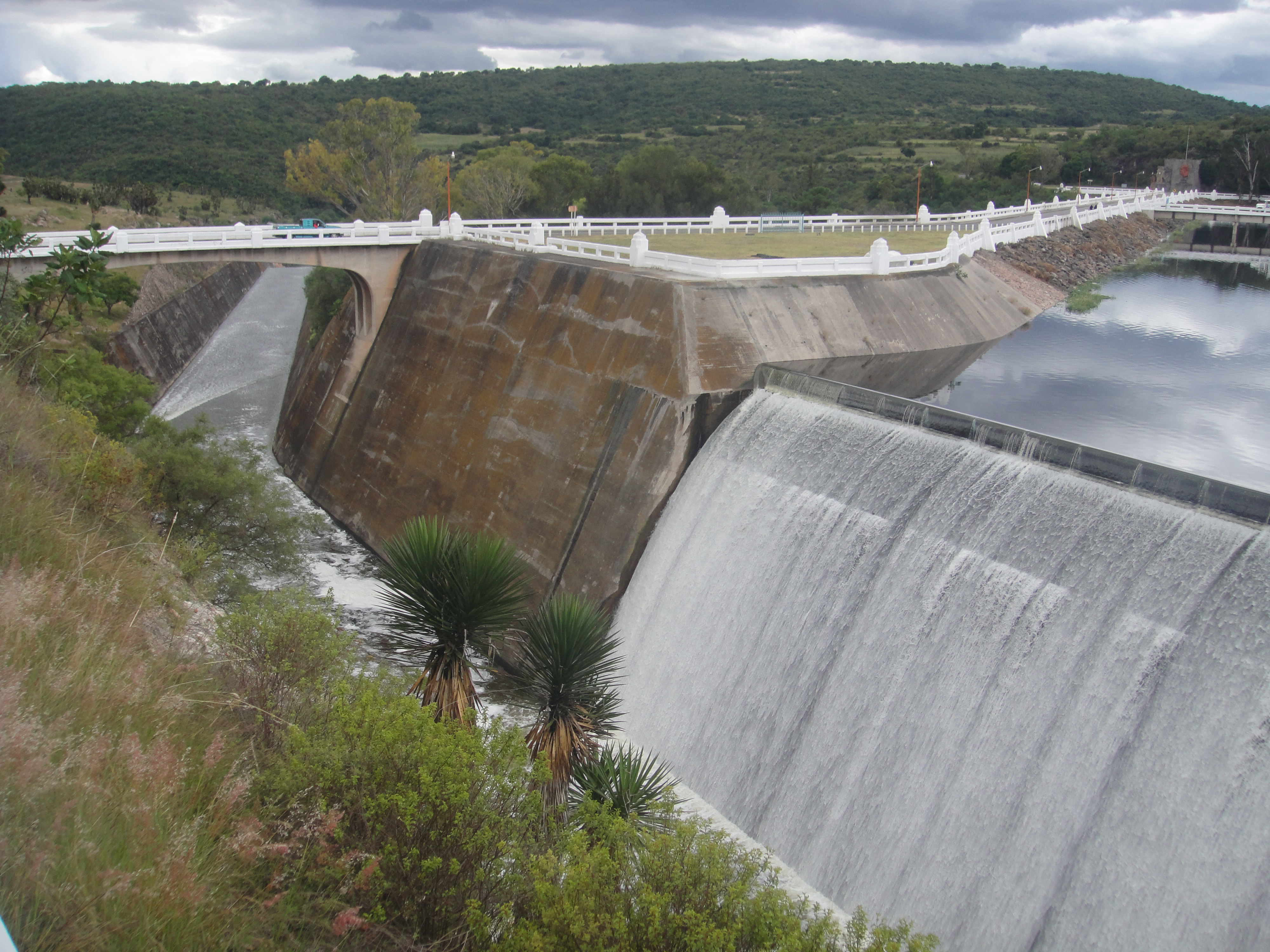 Vista de presa Valsequillo